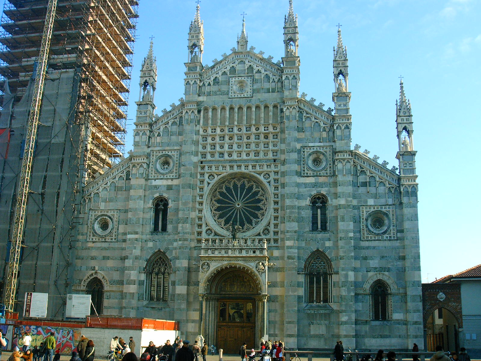 La facciata del Duomo di Monza, progettata alla metà del XIV secolo da Matteo da Campione.